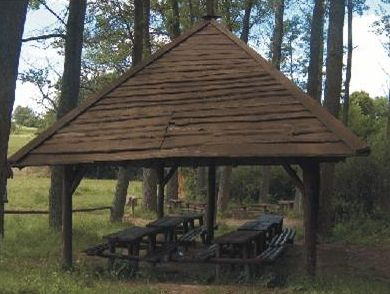 Początek Ścieżki Ekologicznej